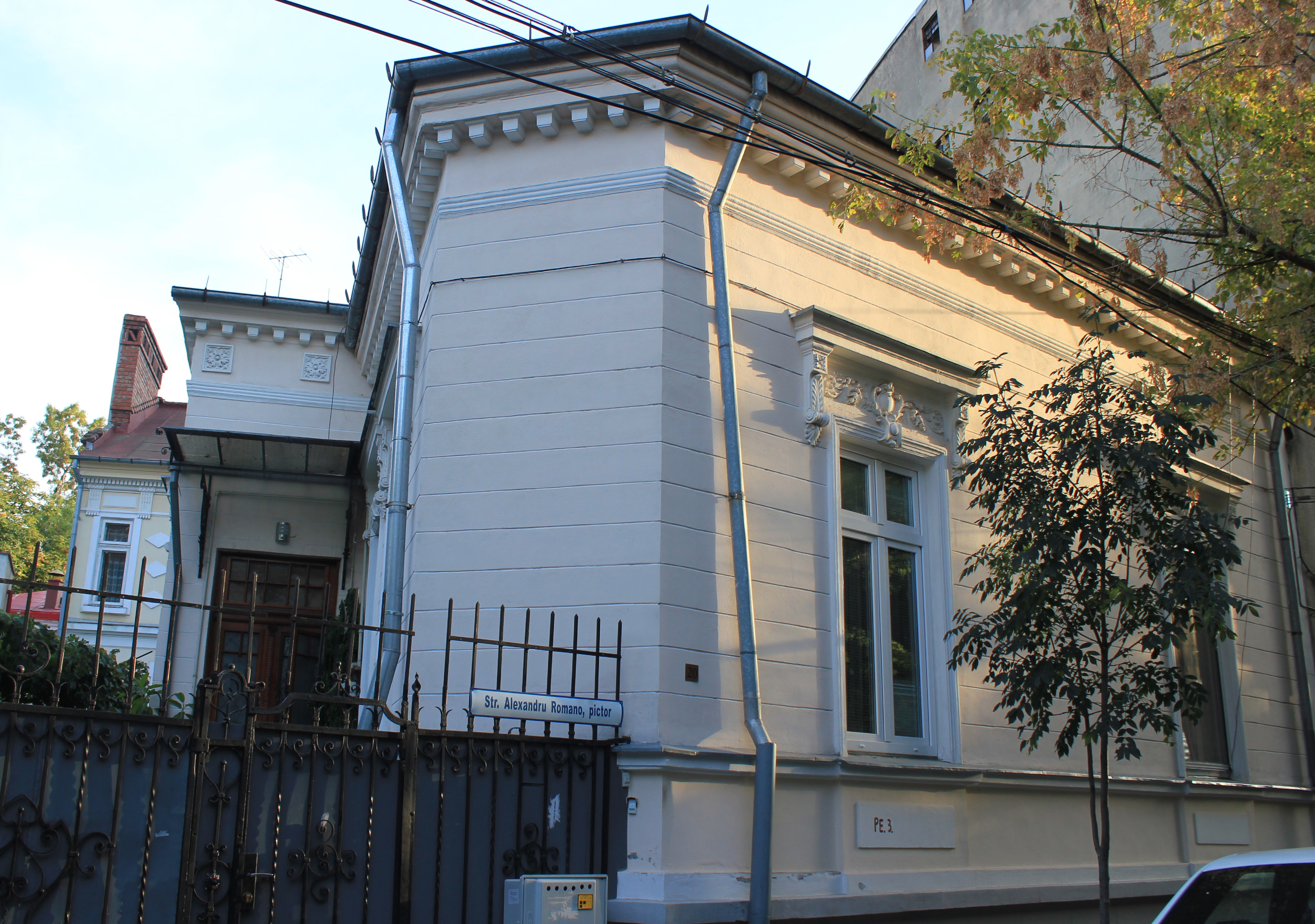 Casa Romano Alexandru 20